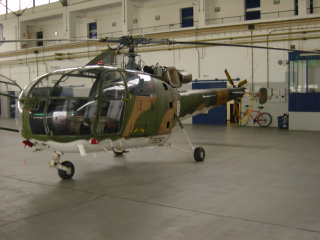 Allouete III Portuguese Air Base 11 Foto do Heli Allouete III- BaseAérea nº.11 Source/Author Soares da Silva